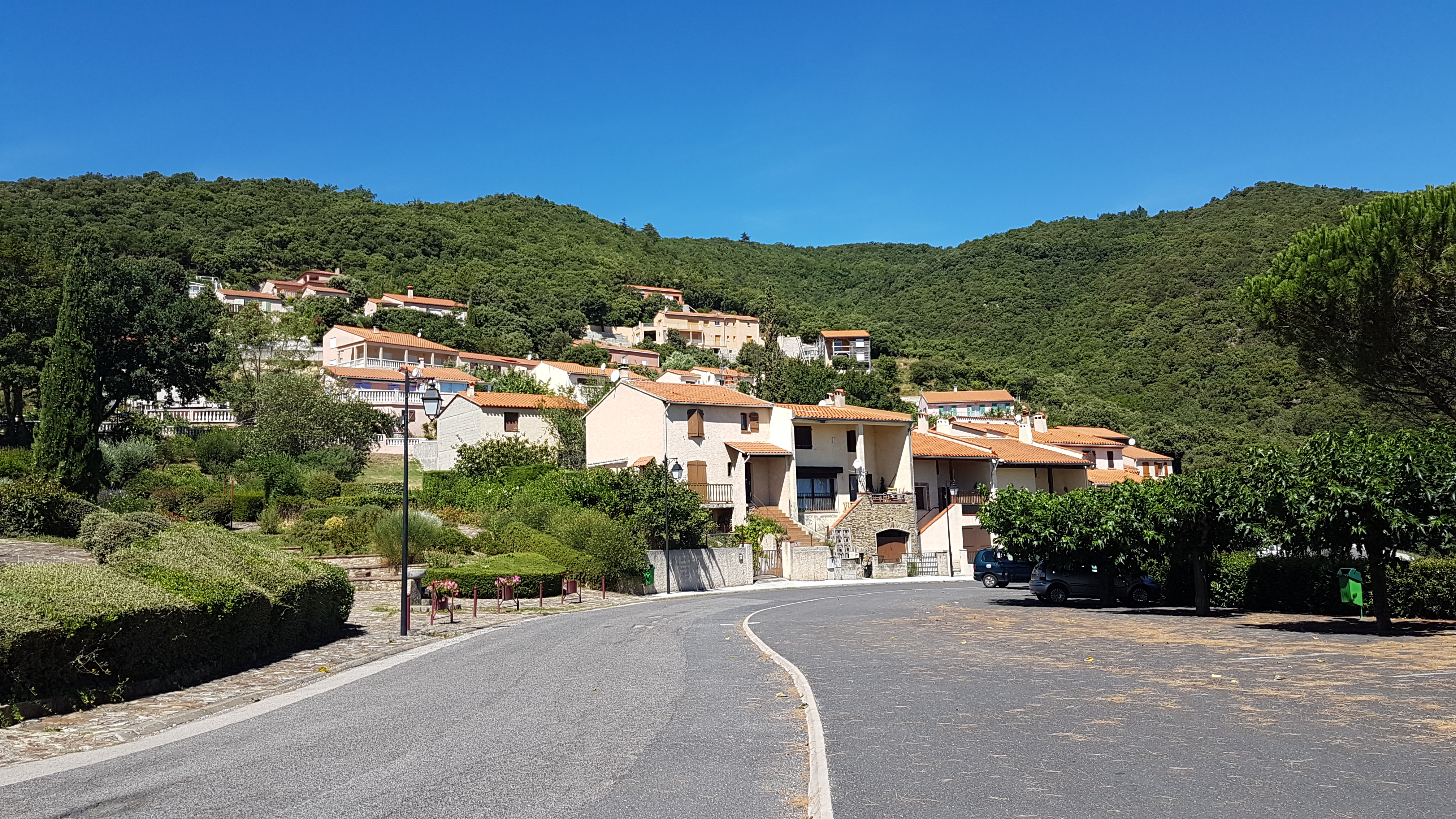 La route D53 au sein du village à Montbolo.